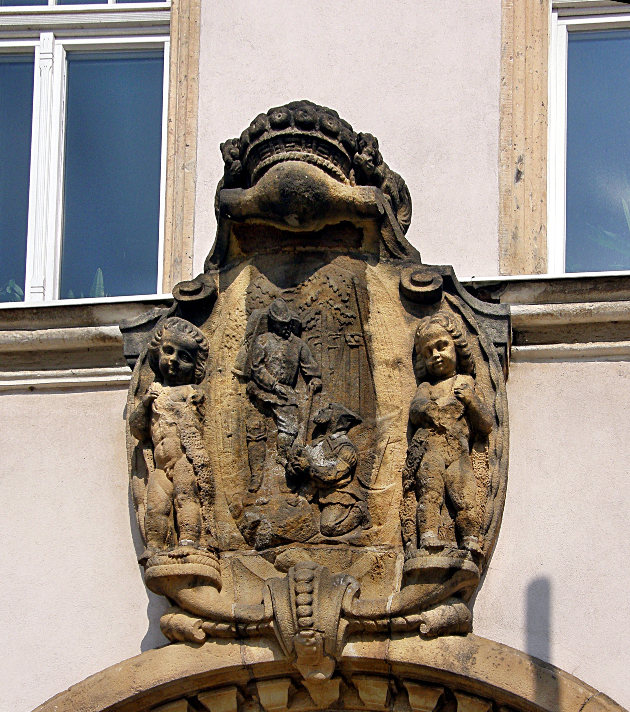 Schneeberg, Rathaus: Kartusche über Eingang